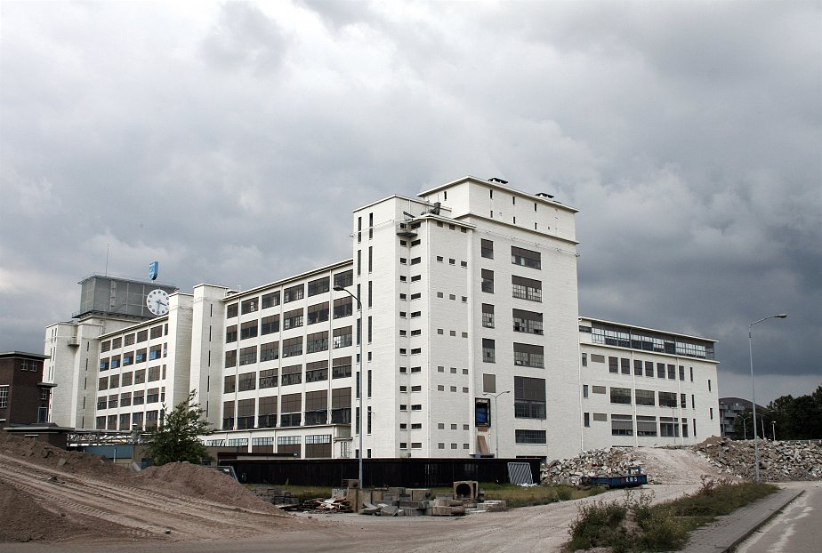 Strijp S, in Eindhoven; voormalig Philips fabrieken en kantoorgenbouwen